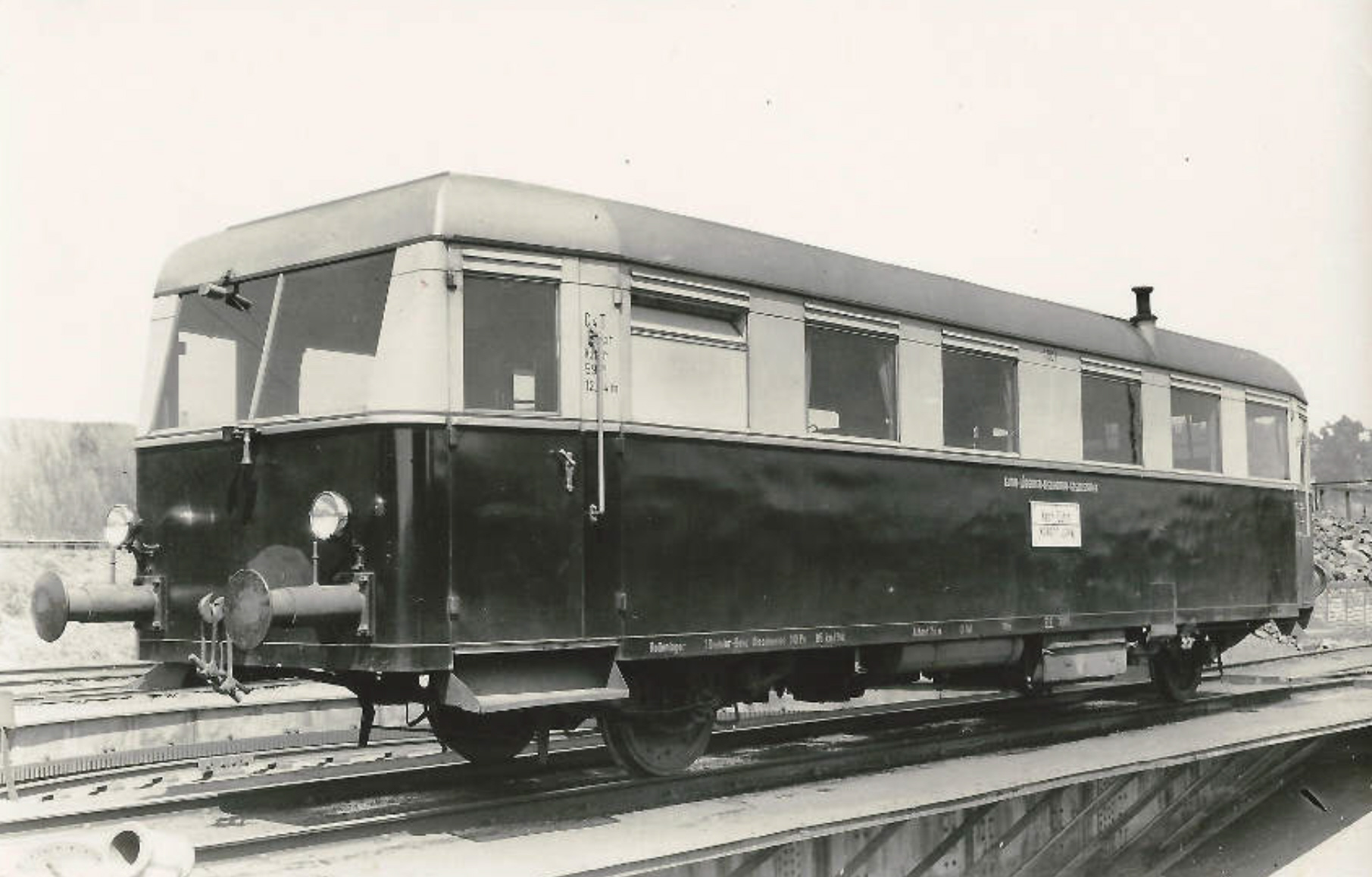 Verbrennungstriebwagen VT A1 1001 der Eutin-Lübecker Eisenbahn; Baujahr 1934, Verbleib nach 1944 unbekannt